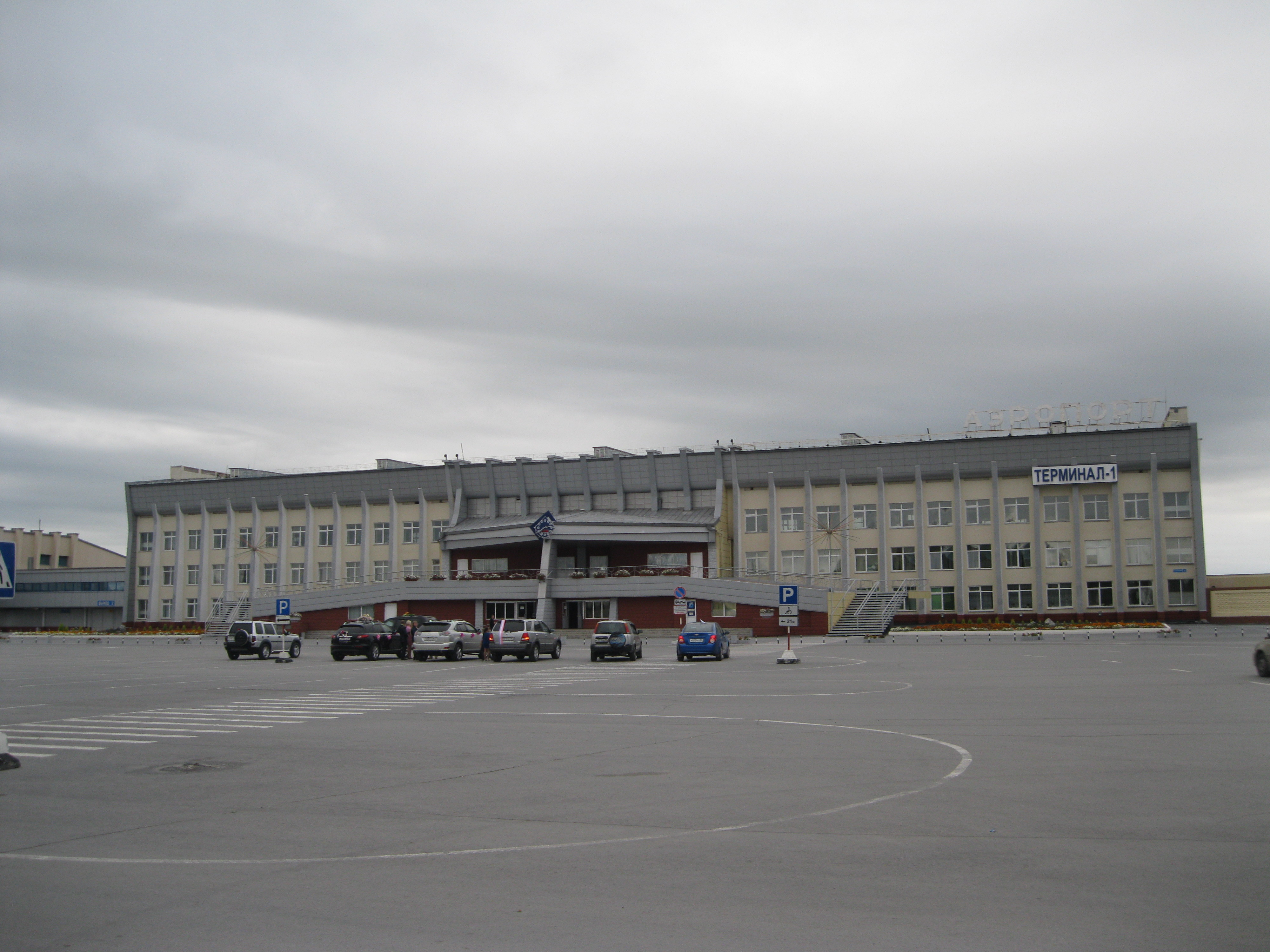 Терминал 1 аэропорта в Нижневартовске